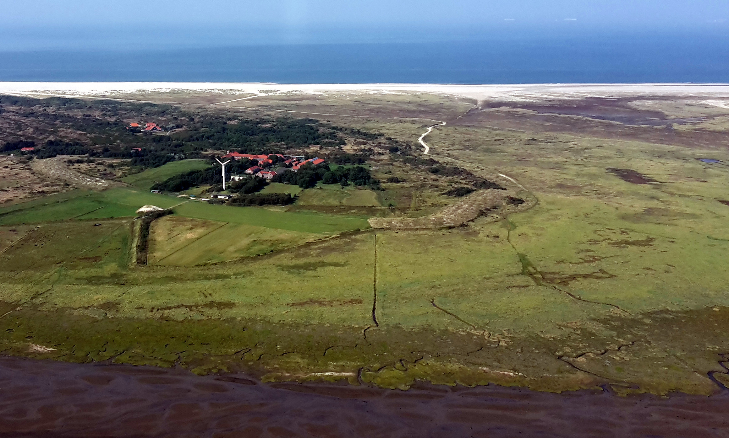 Hermann Lietz-Schule Spiekeroog, Schulgelände und Gebäude